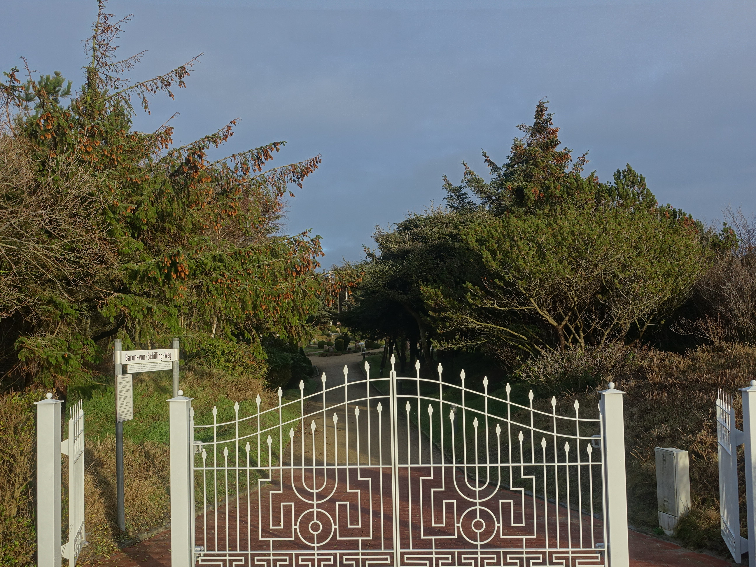 Eingangstor zum Dünenfriedhof Langeoog, benannt nach Libau in Kurland; dahinter der Baron-von Schilling-Weg.